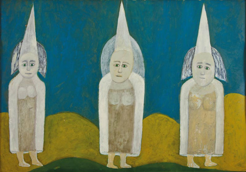 Sekulić Sava, Klica života,b. g.ulje-karton,72 x 102 cm